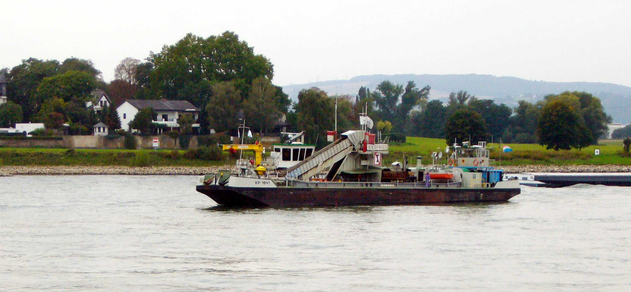 Baggerarbeiten auf dem Rhein